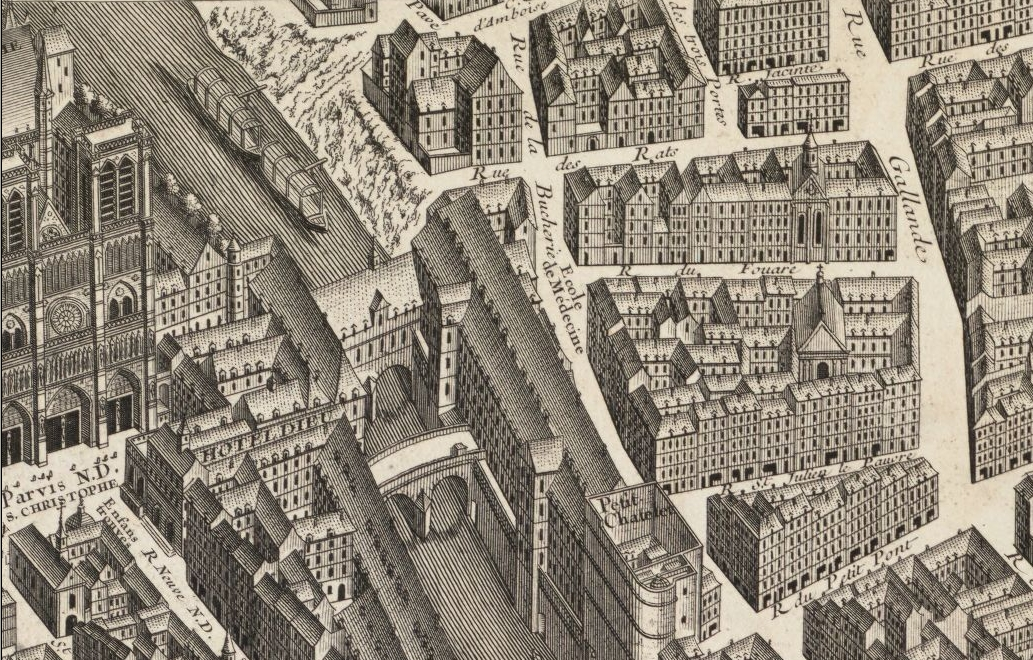 La rue des Rats à Paris sur le plan Bretez de 1739